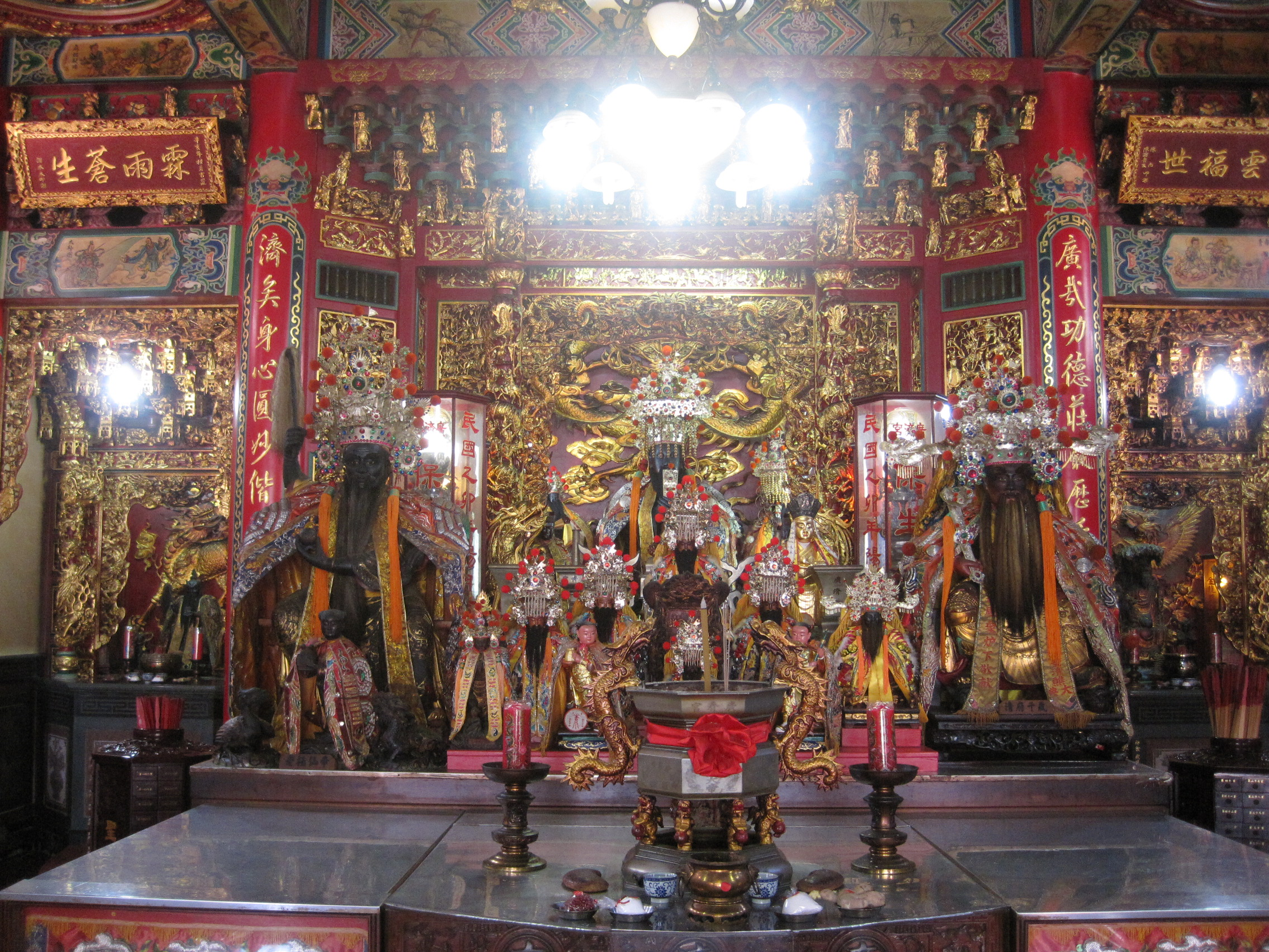 安平廣濟宮正殿